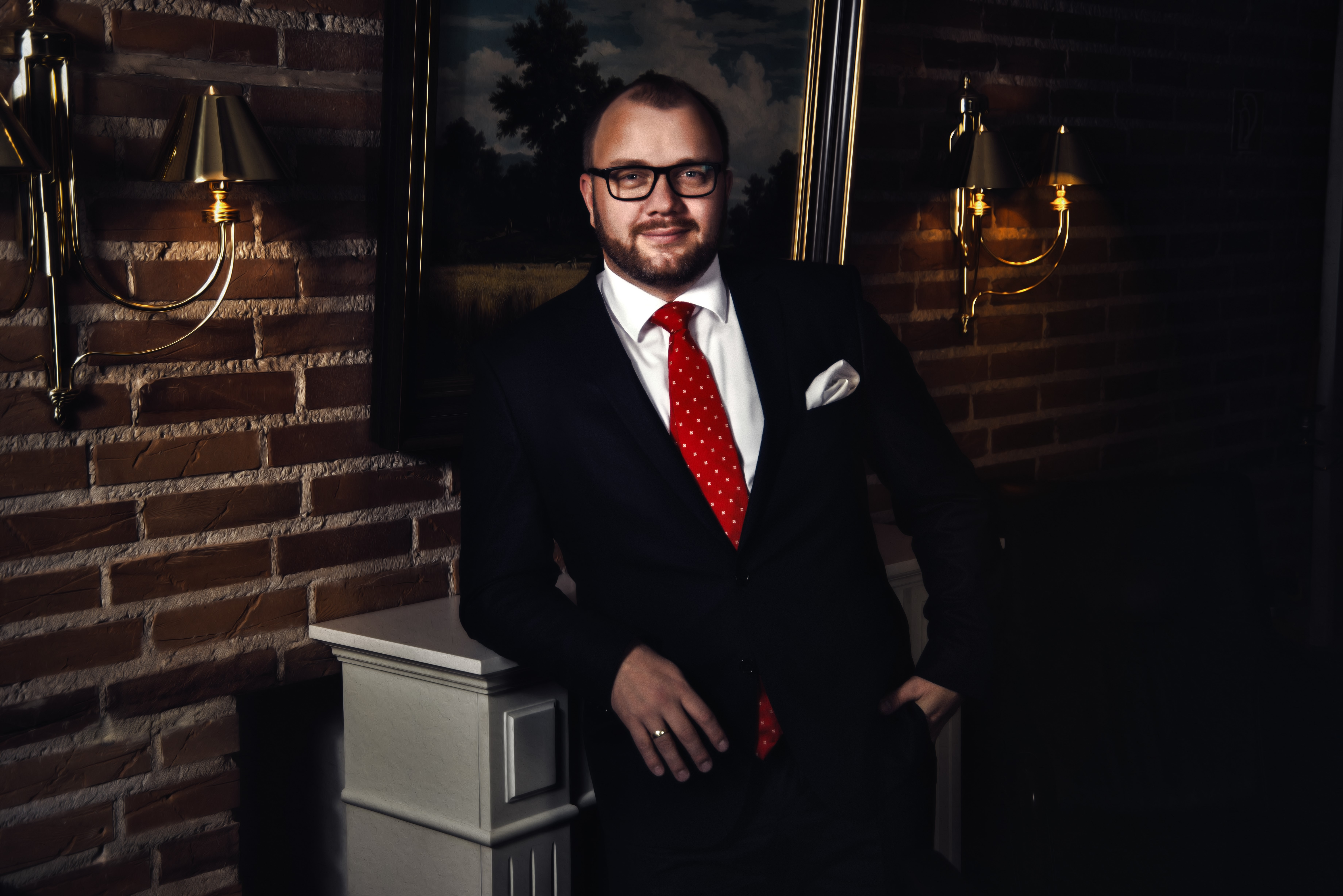 Michael Ehlers, Rhetoriktrainer, Profispeaker und Bestsellerautor